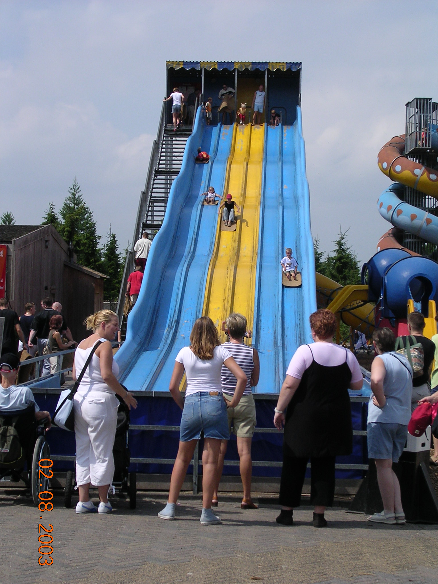 Glijbaan in het dolfinarium Harderwijk. Zelf gemaakt, aug 2003, vrij van rechten.